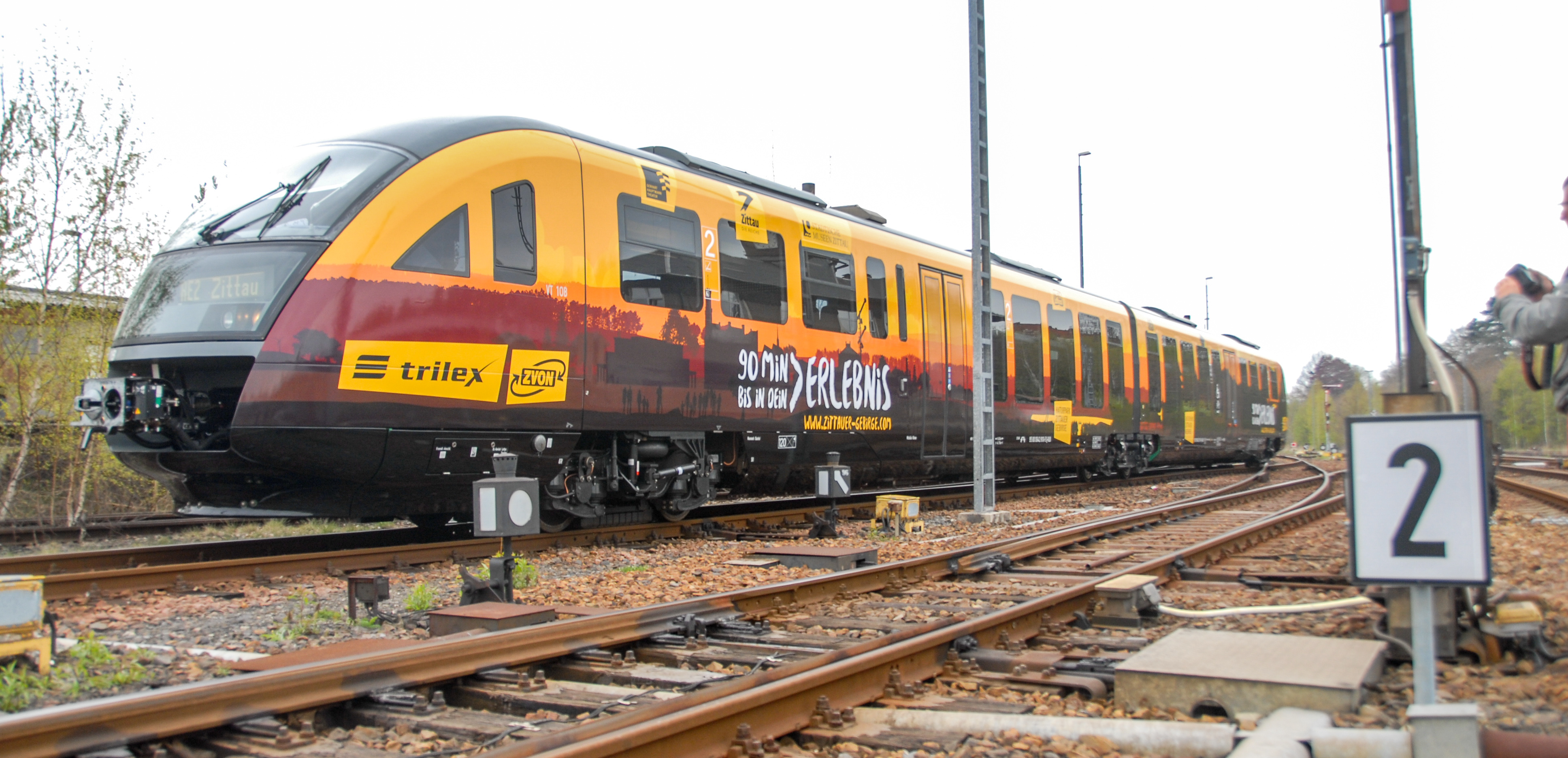 Der gestaltete Desiro-Triebwagen der Trilex mit dem Namen "Oberlausitz-Express" im Bahnhof Zittau. Erste Fahrt war am 21. April 2017.